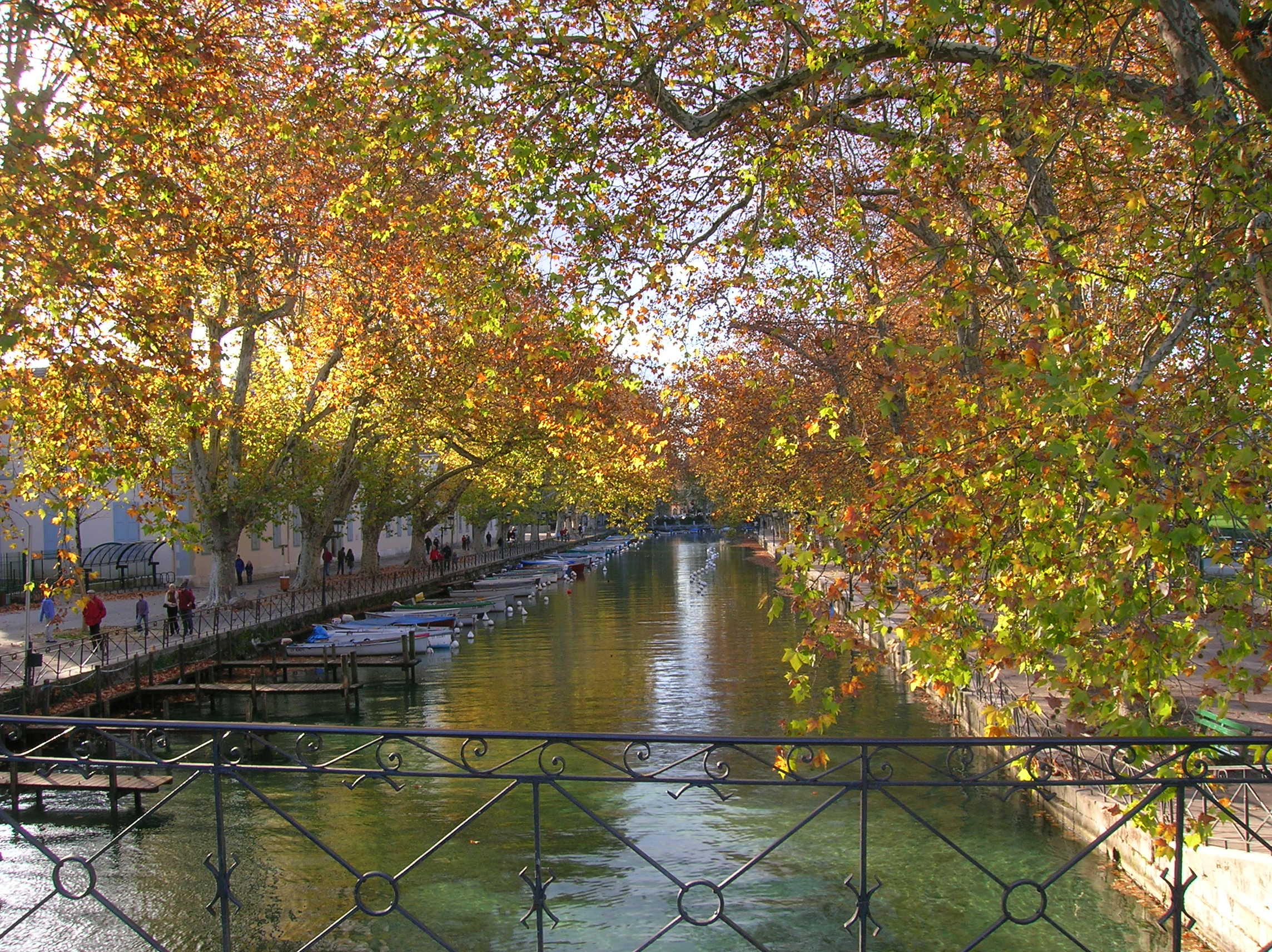 Canal du Vassé, Annecy, France